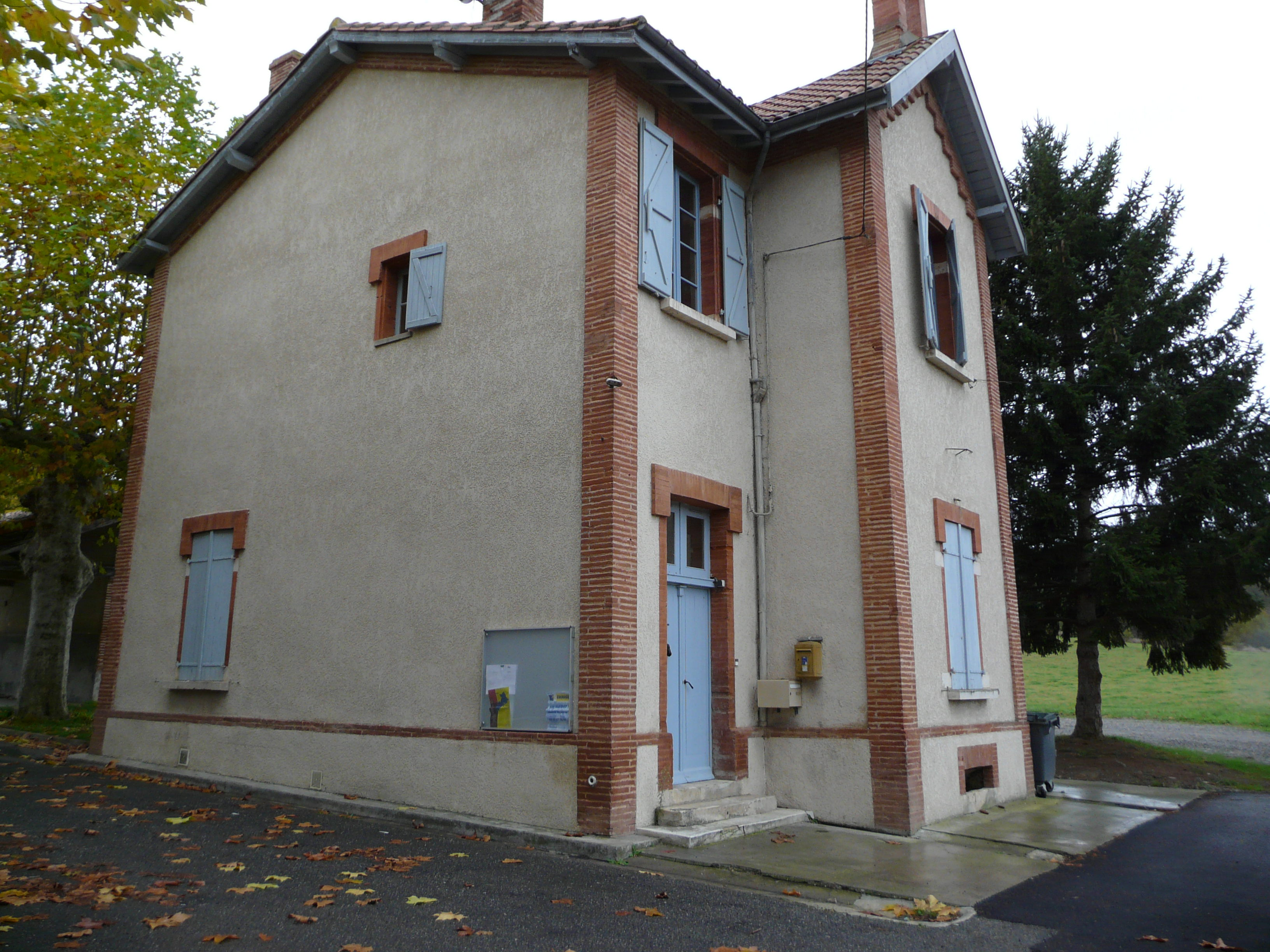 Mairie de Mailholas